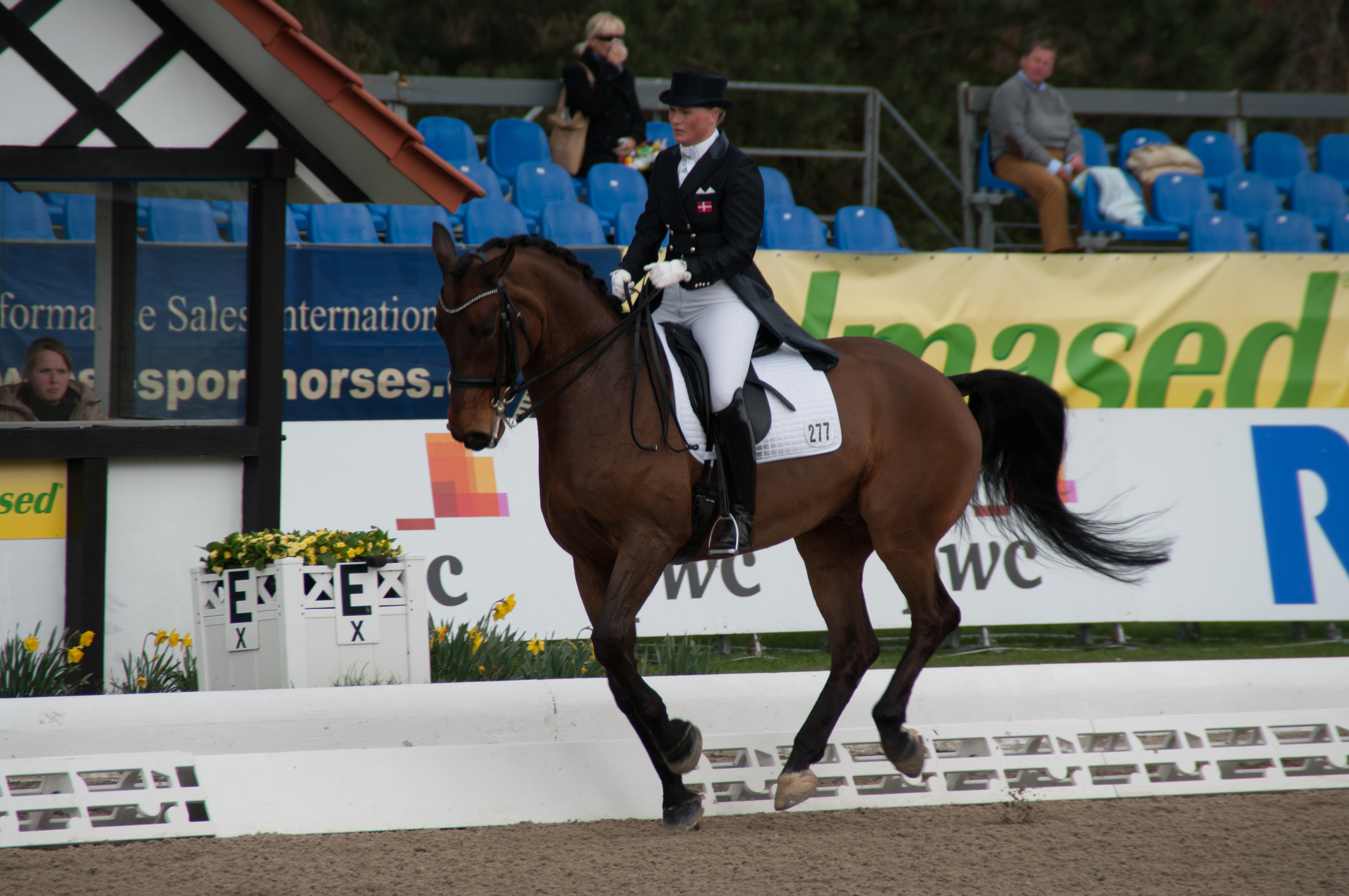 Horses & Dreams 2013: Die dänische Dressurreiterin Lone Bang Larsen mit Fitou L